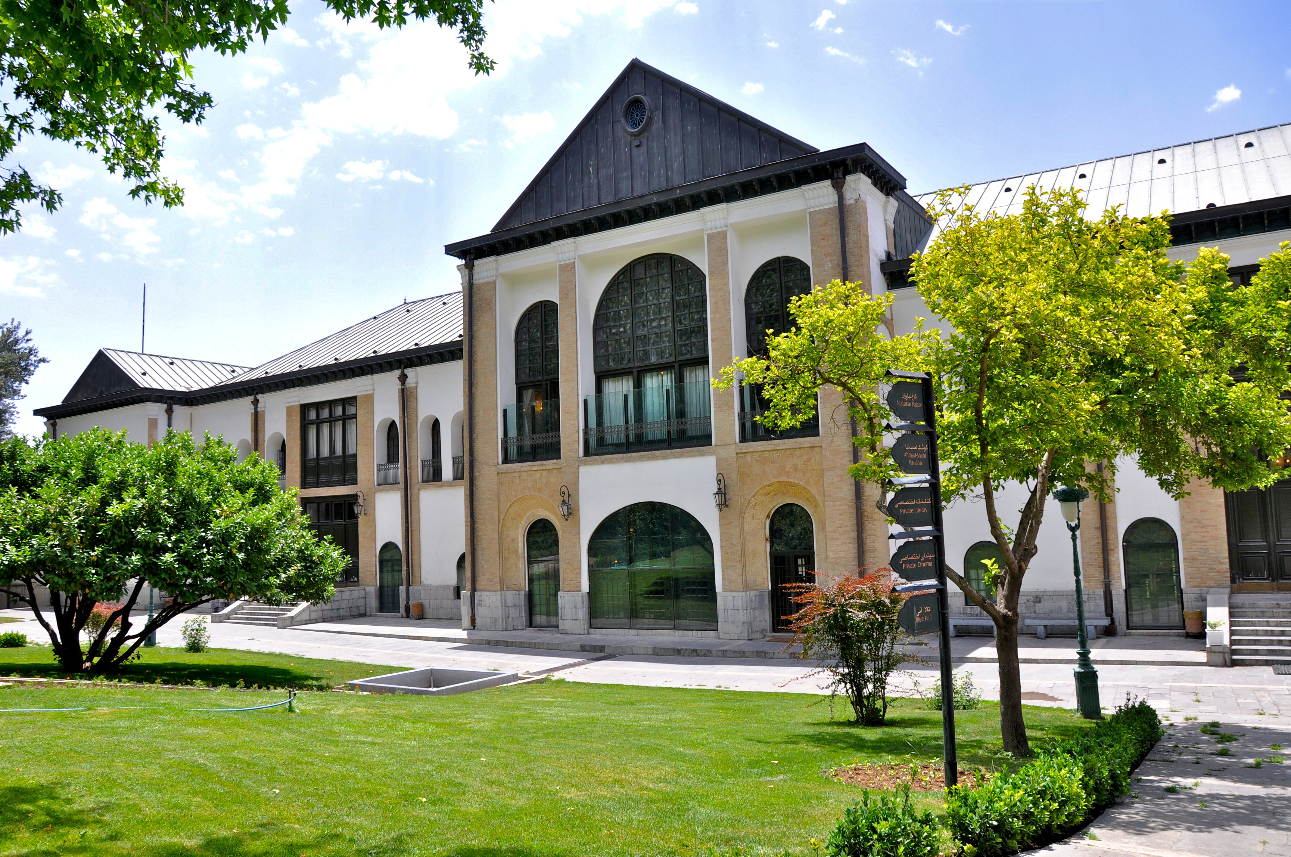 Sahebgharaniyeh Palace -کاخ صاحبقرانیه